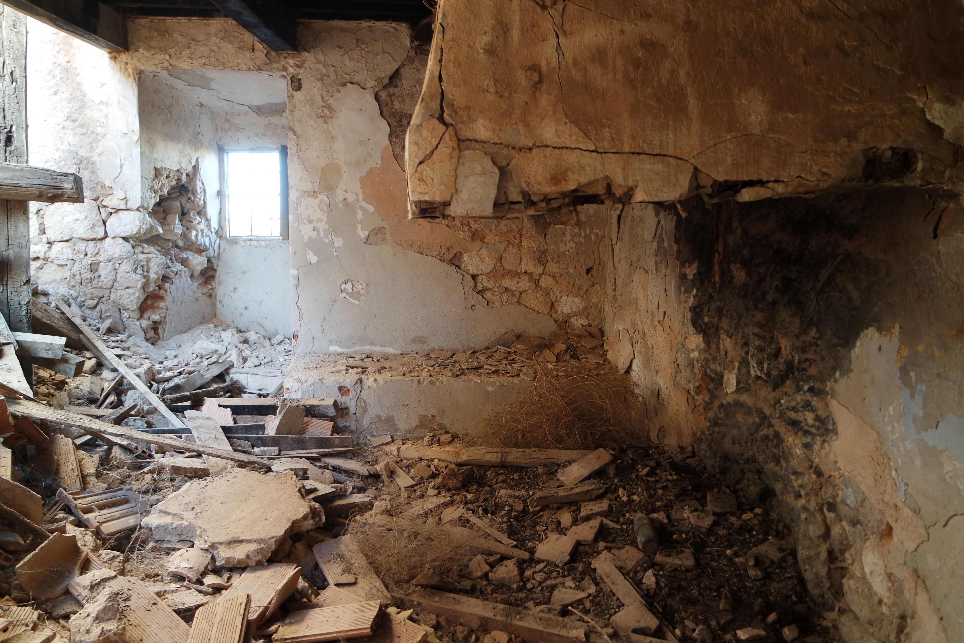 Interior del Castillo de Santiago la Torre